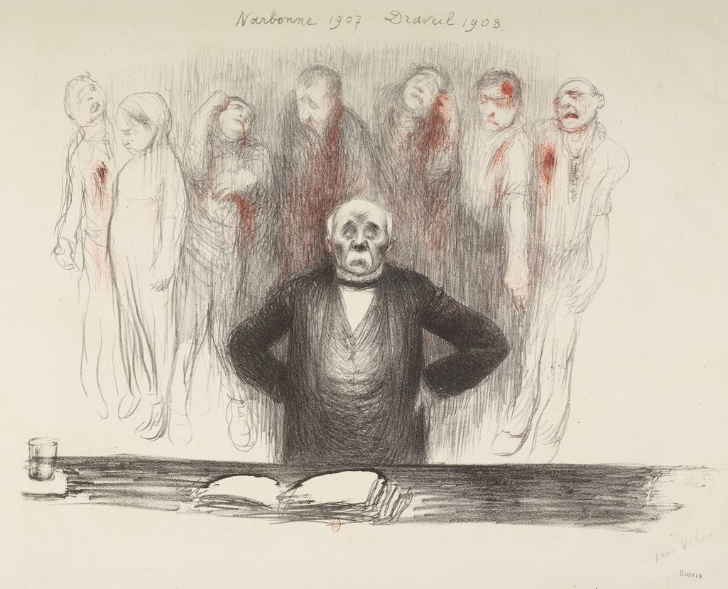 Narbonne 1907 Draveil 1908 : Clemenceau à la tribune, caricature de Jean Veber évoquant les morts des répressions menées à Narbonne (11 juin 1907) et Draveil (1908) sous le ministère de Georges Clemenceau.